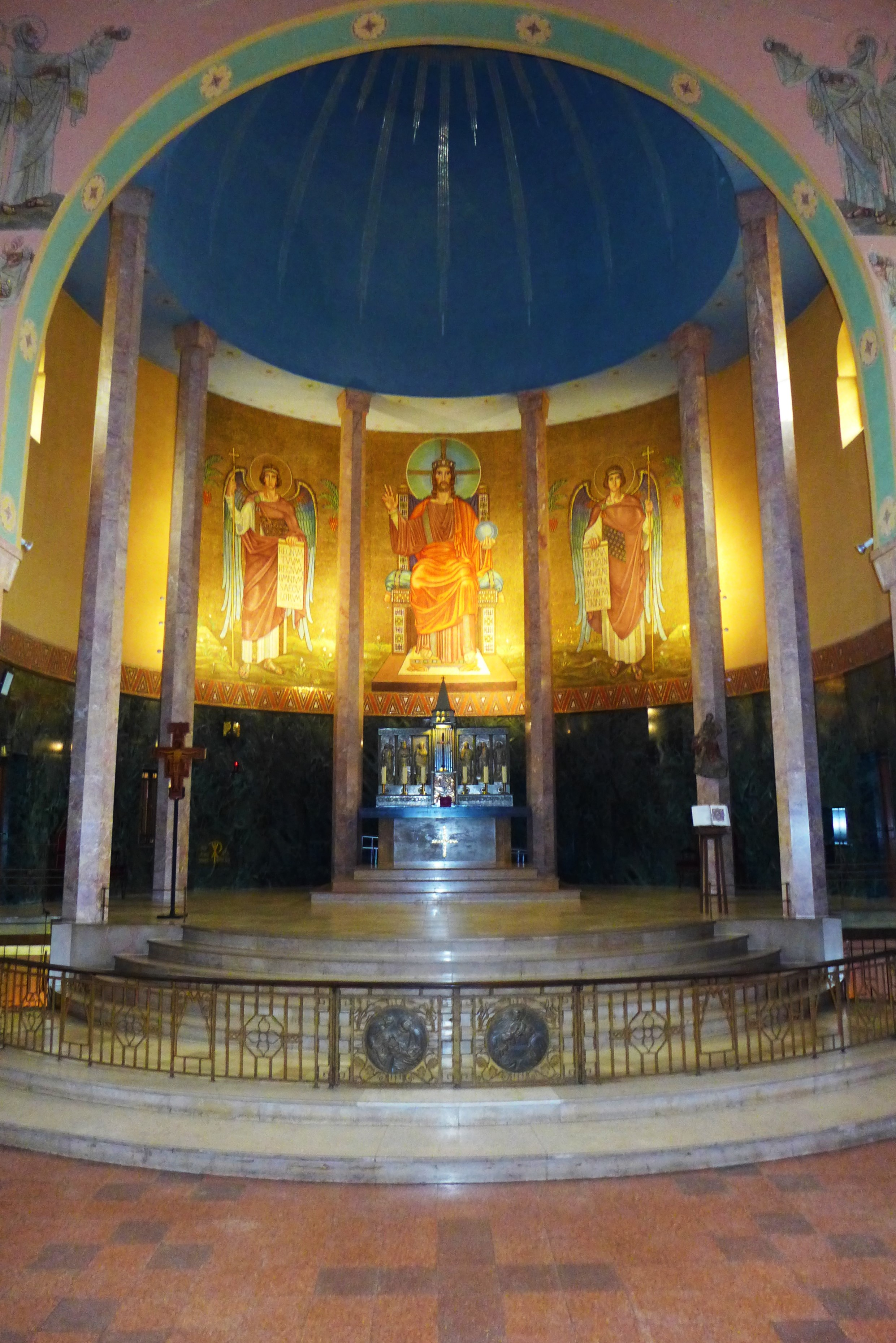 Christkönig-Kirche (Saarbrücken), Apsis